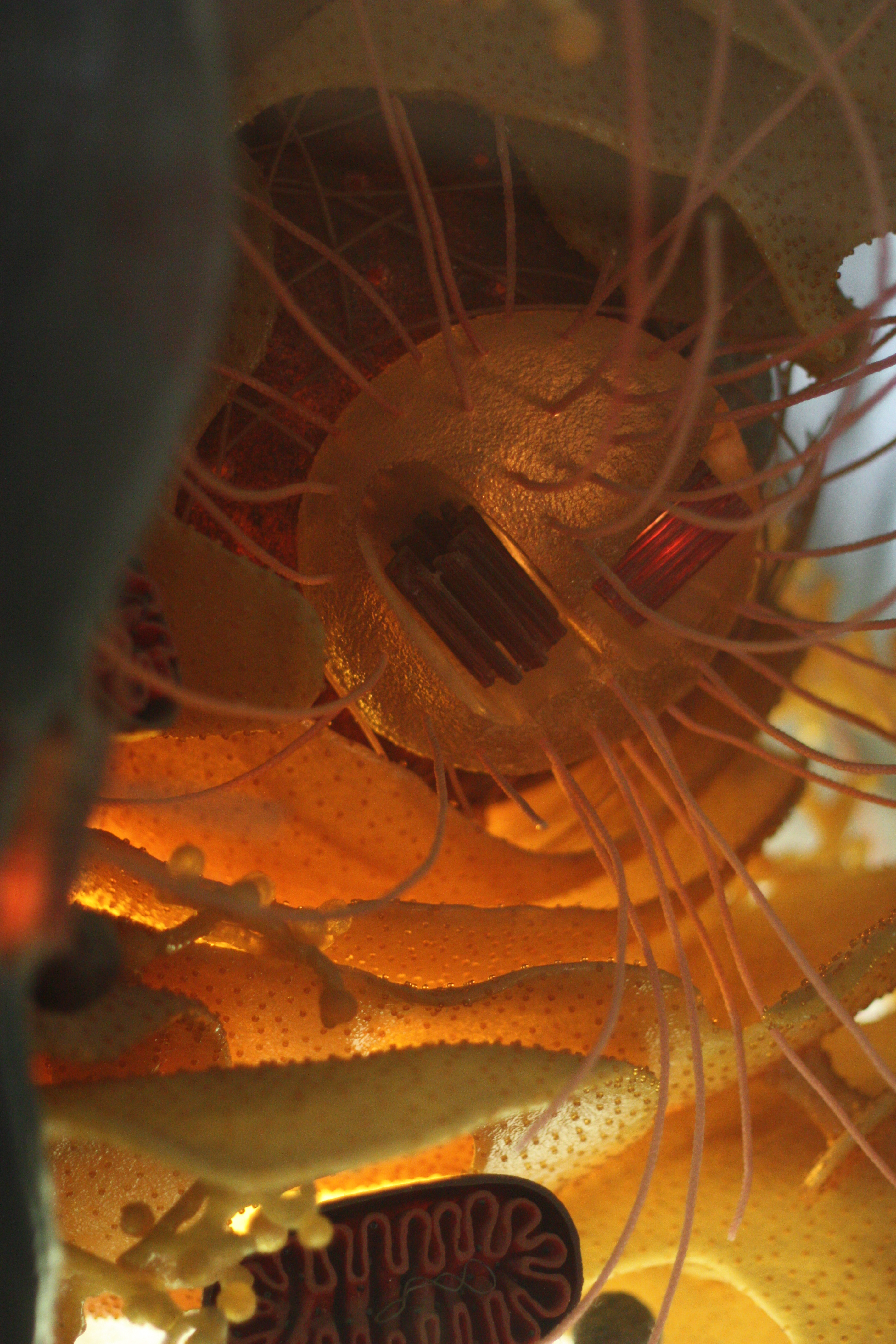 Cell models, Modell einer Zelle, im Überseemuseum Bremen